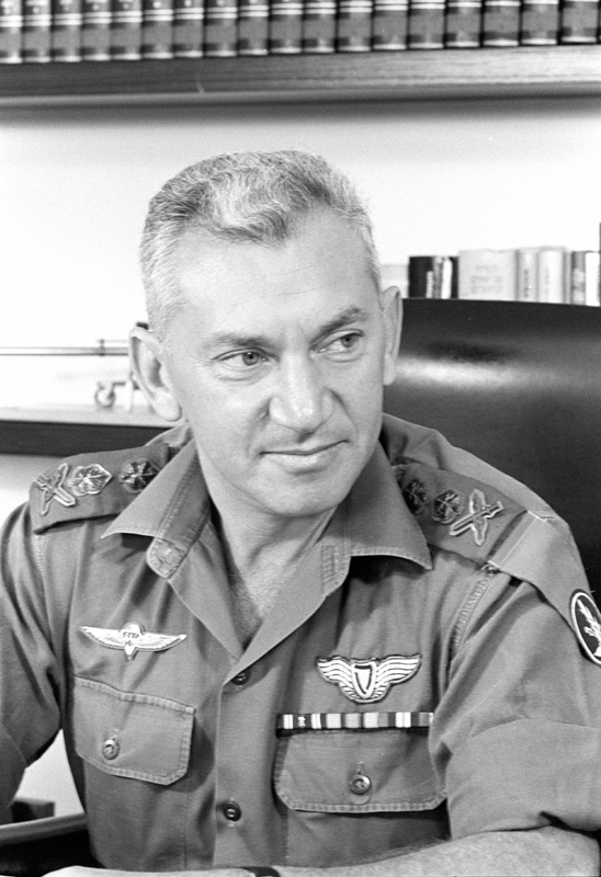 הרמטכ"ל רא"ל חיים בר לב.